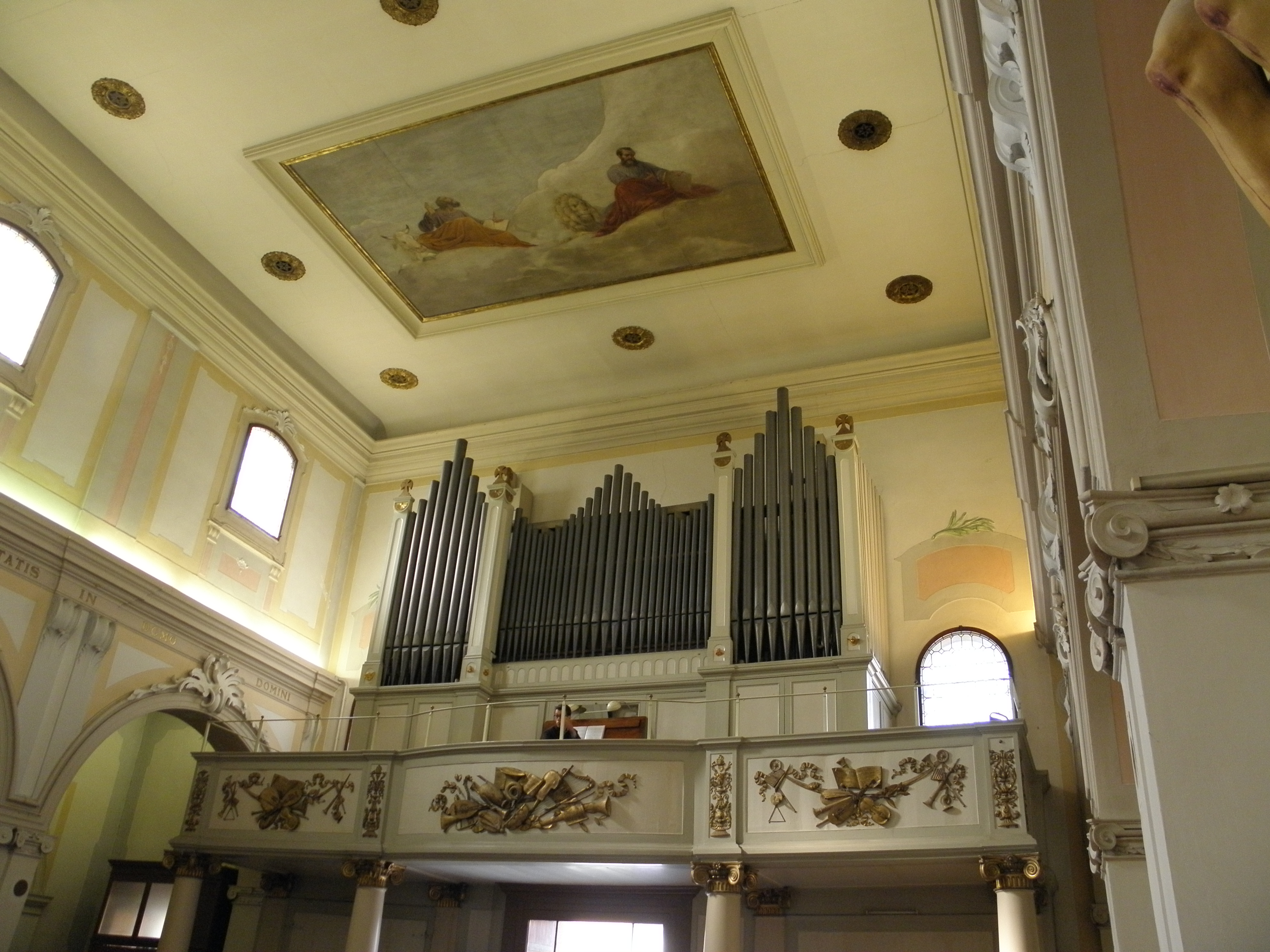 Mogliano Veneto, la chiesa arcipretale di Santa Maria Assunta.